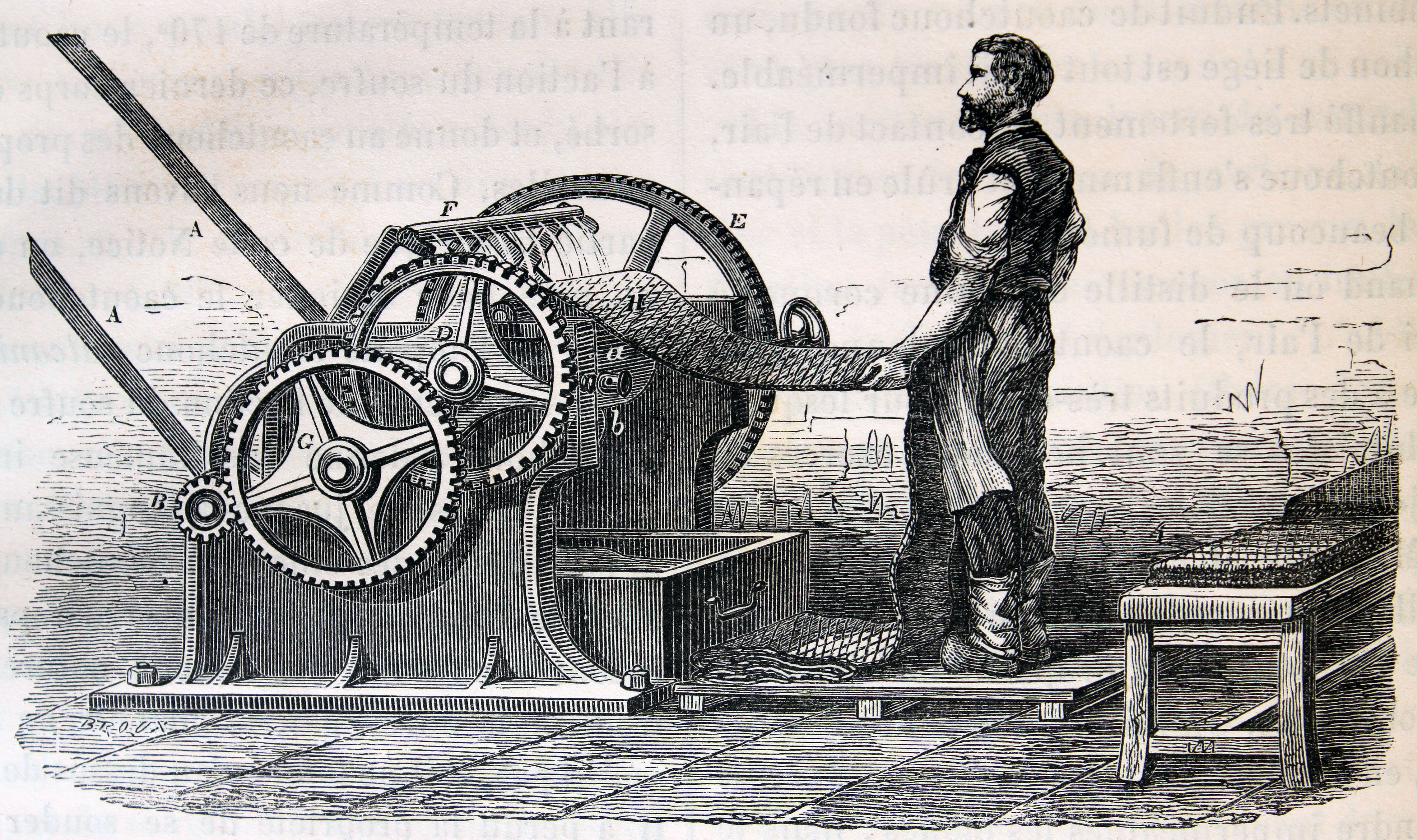 Ilustraciones de la obra : Les merveilles de l'industrie ou, Description des principales industries modernes / par Louis Figuier. - Paris : Furne, Jouvet, [1873-1877]. - Tome II